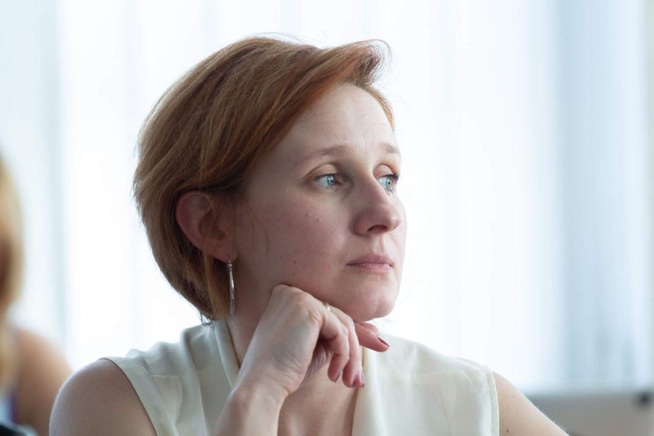 Портретне фото професора Толстанової Ганни Миколаївни